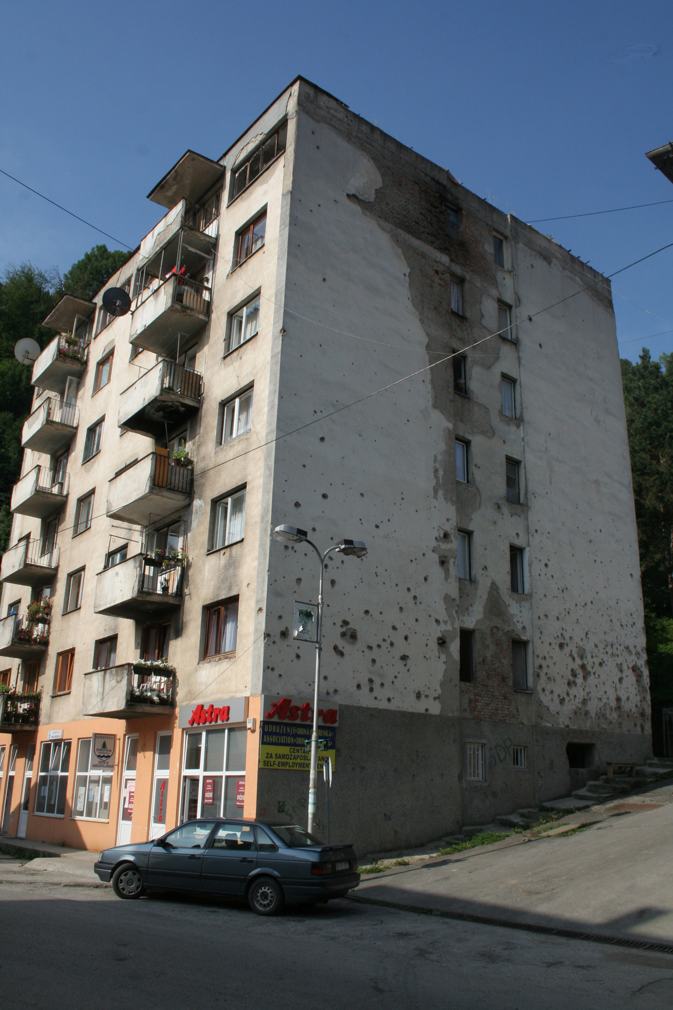 Kogelgaten in een gebouw in Srebrenica.